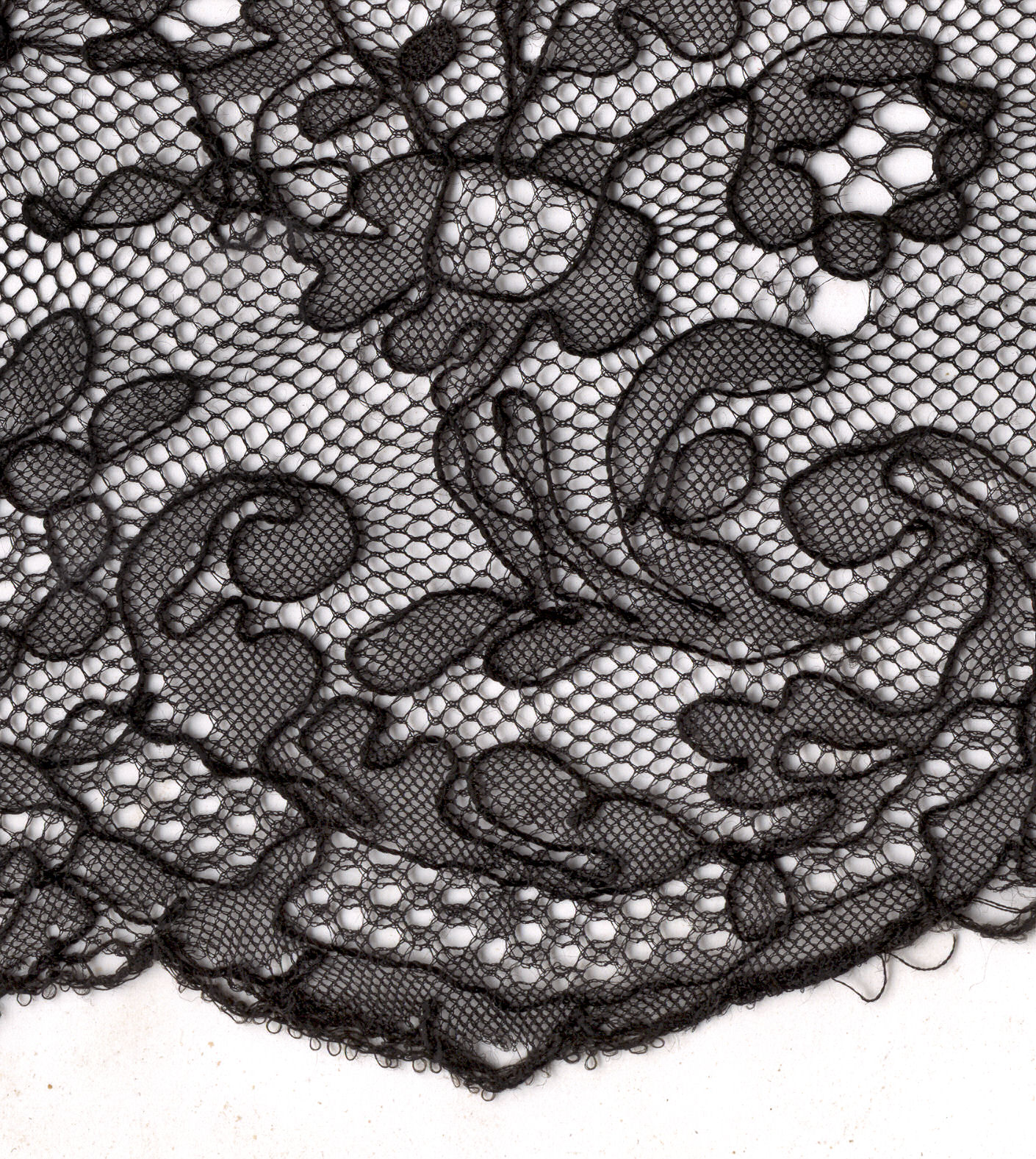 private collection